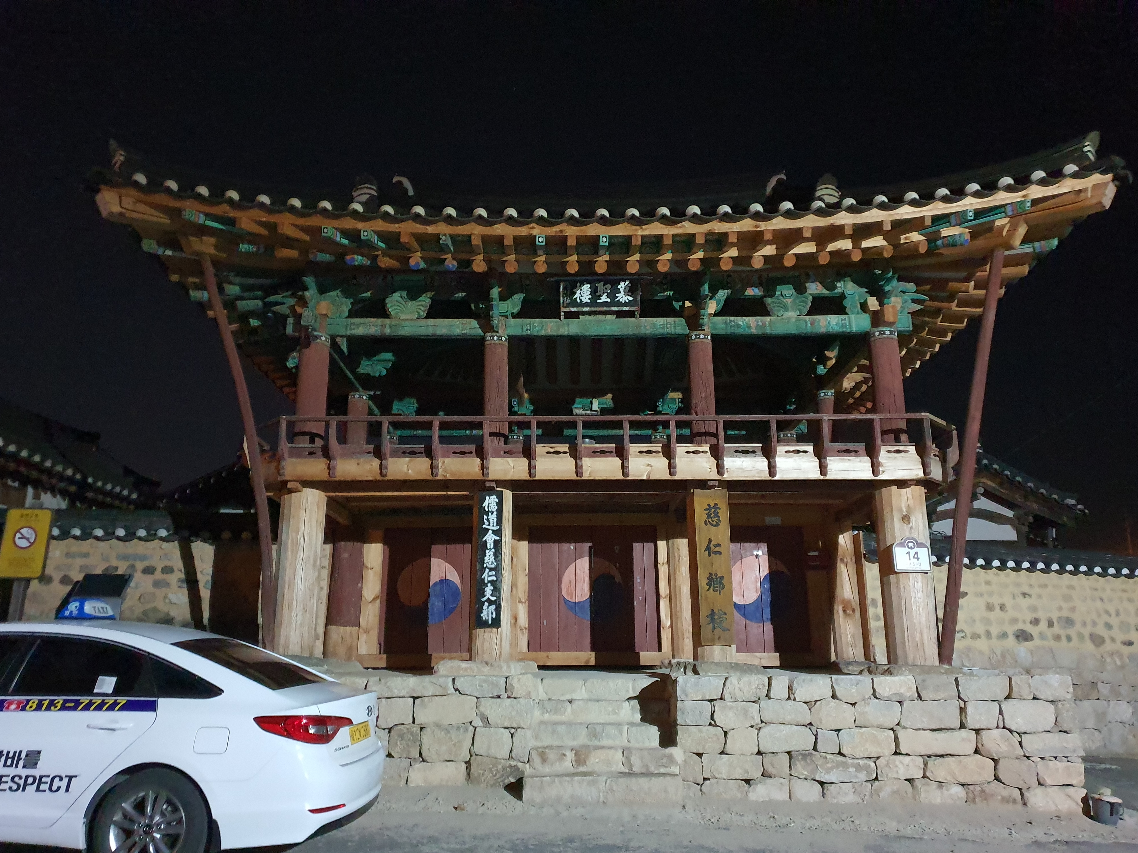 경상북도 경산시 자인향교